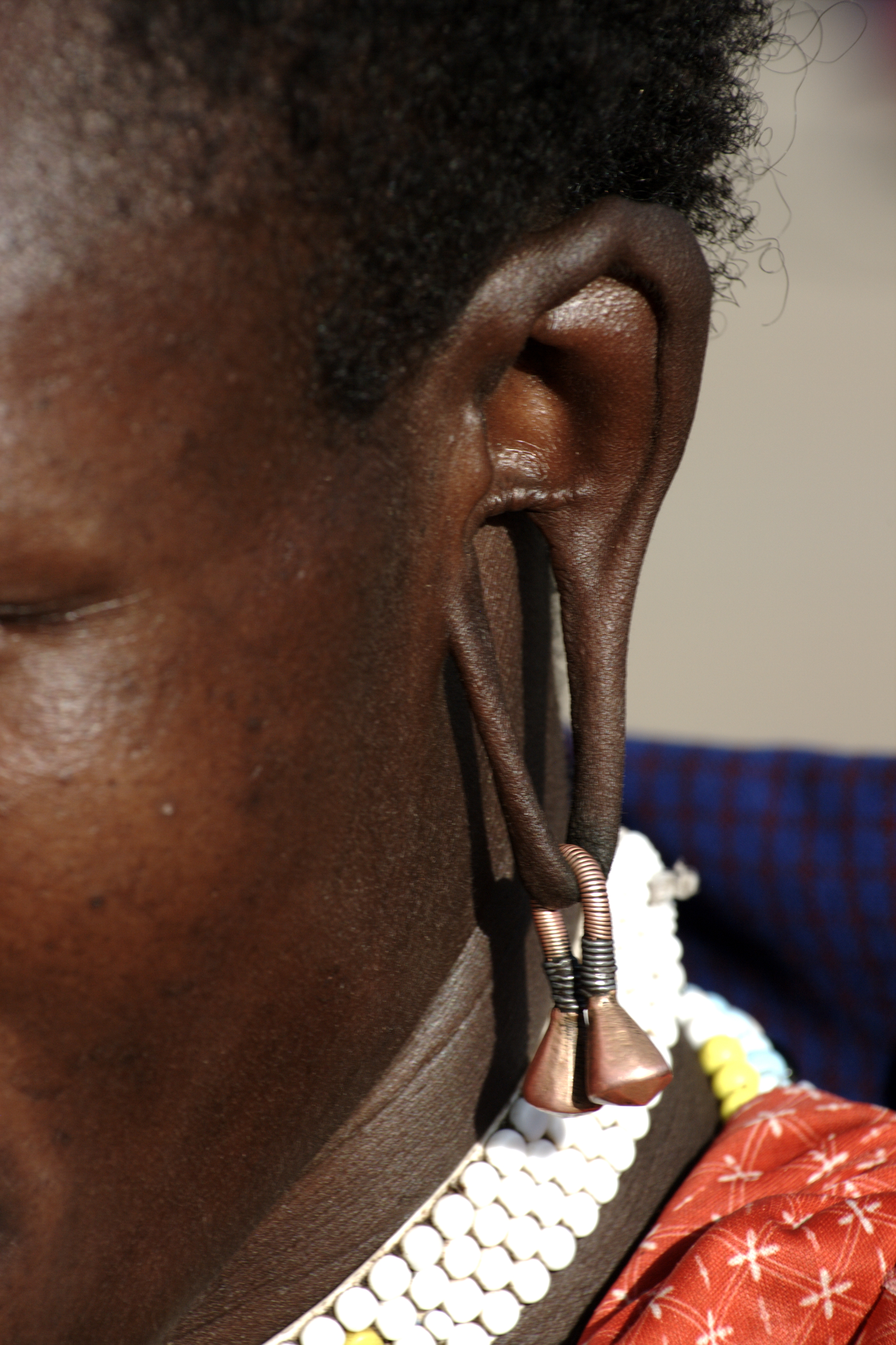 Parure d'oreille d'une femme Masaï, en Tanzanie.